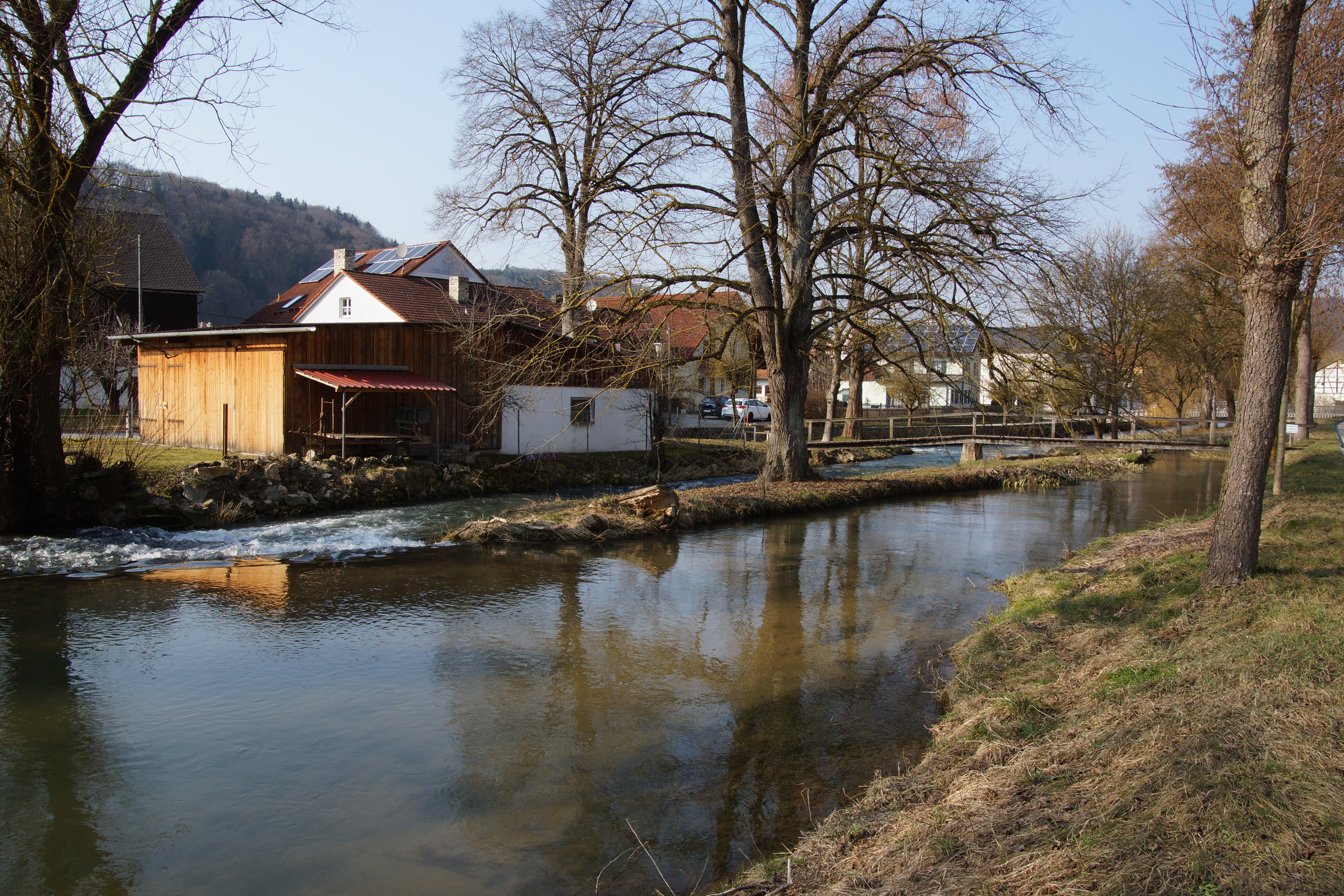 Enkering bei Kinding